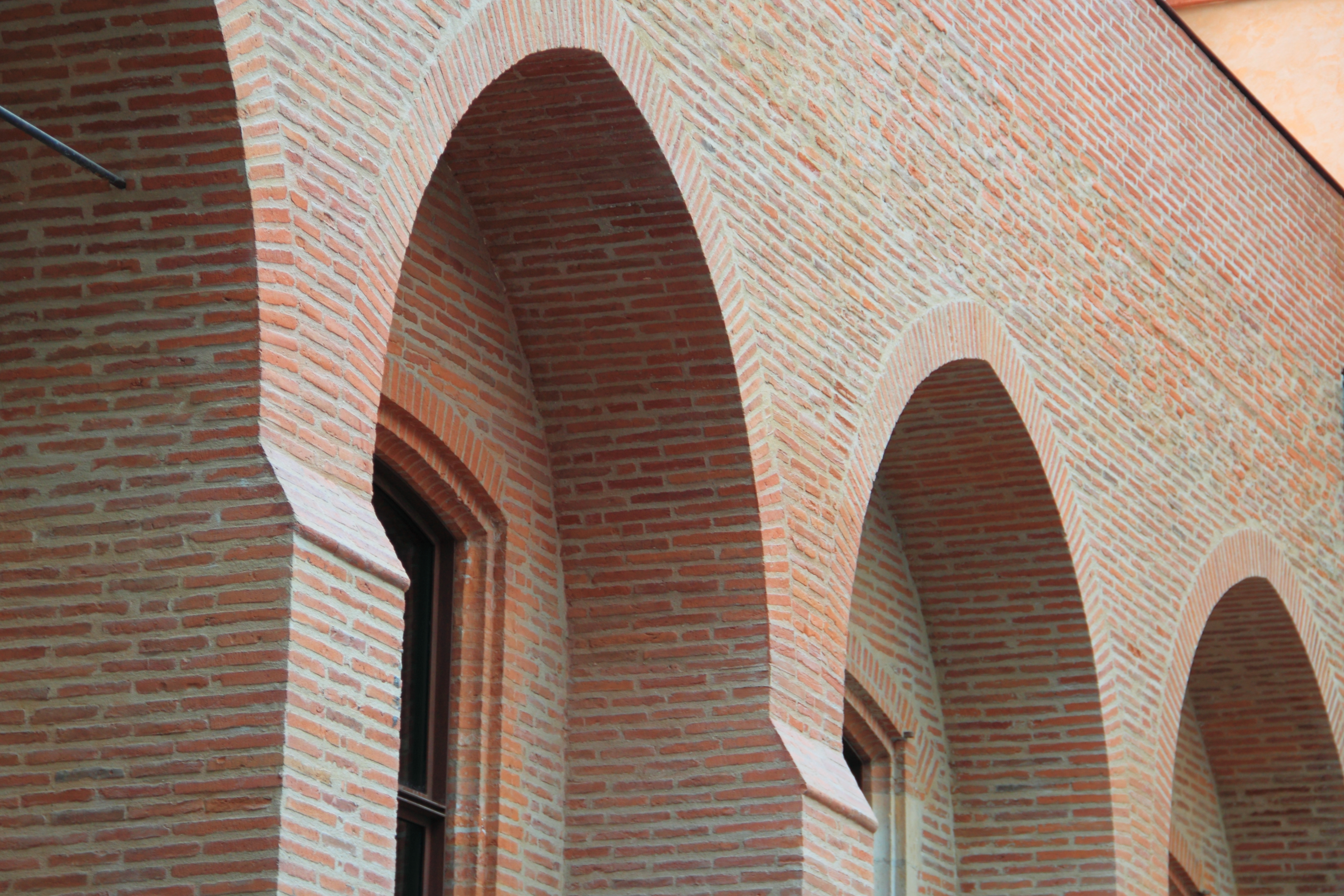 Palais de Justice de Toulouse (Haute-Garonne, France).